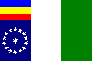 Municipio de Tibirita (Bandera)